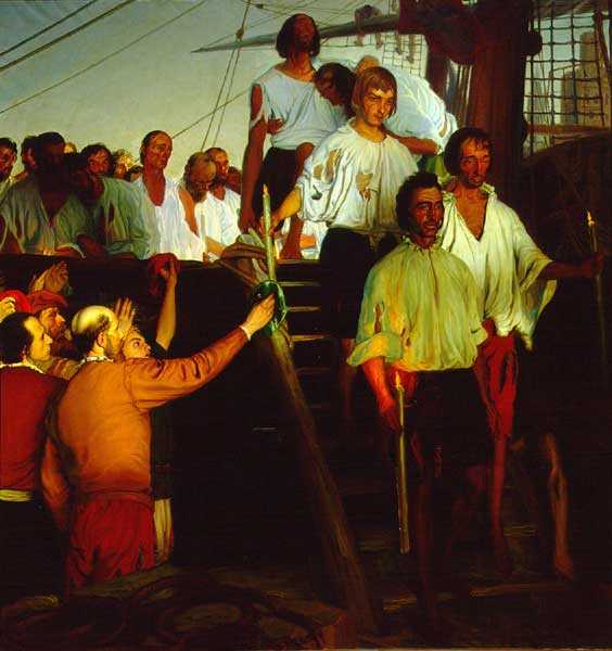 El desembarco de Elcano en Sevilla, de Elías SalaverriaEuskara: “Elkanoren eskaintza”, E. Salaberria